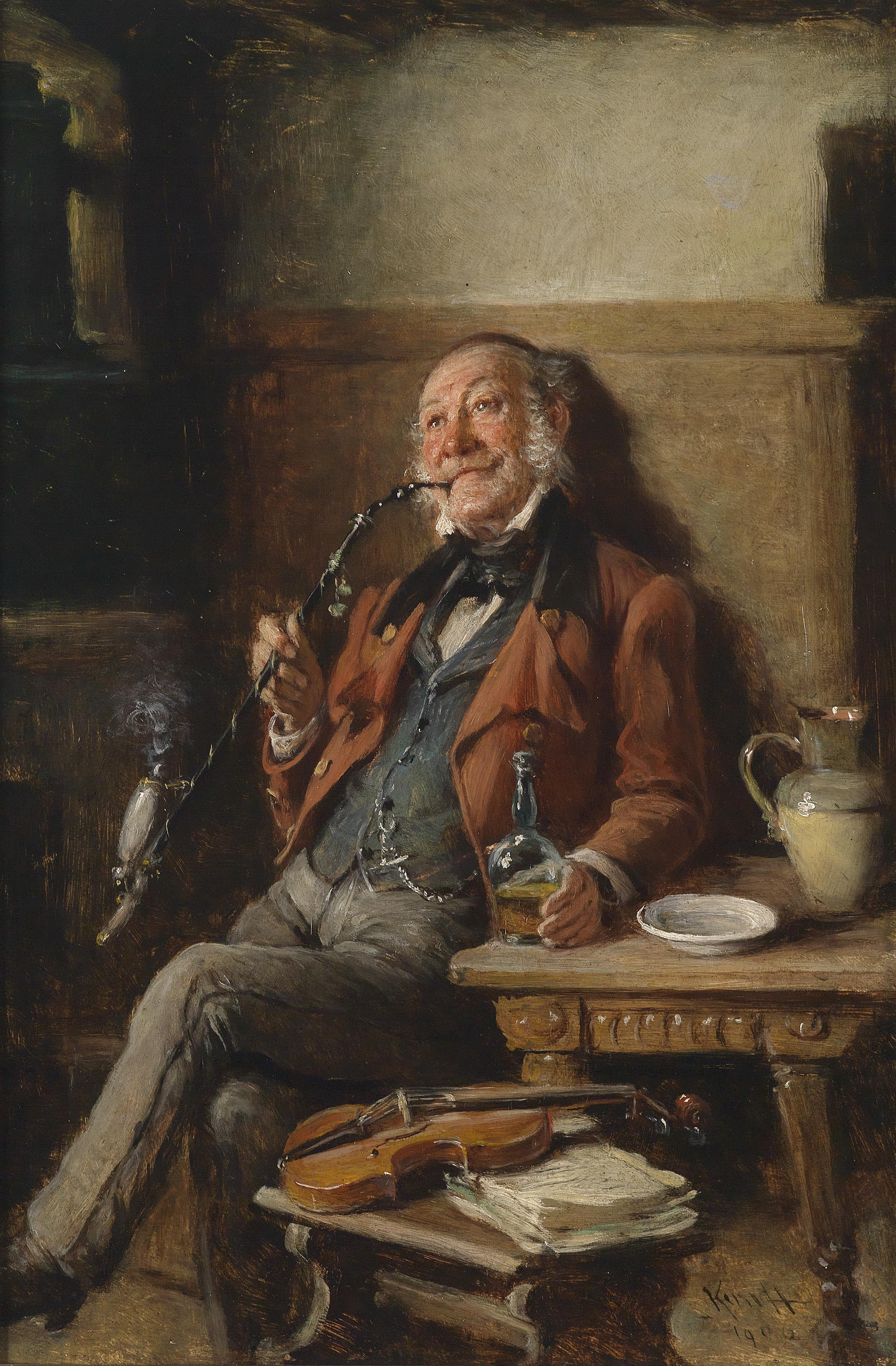 Mußestunde